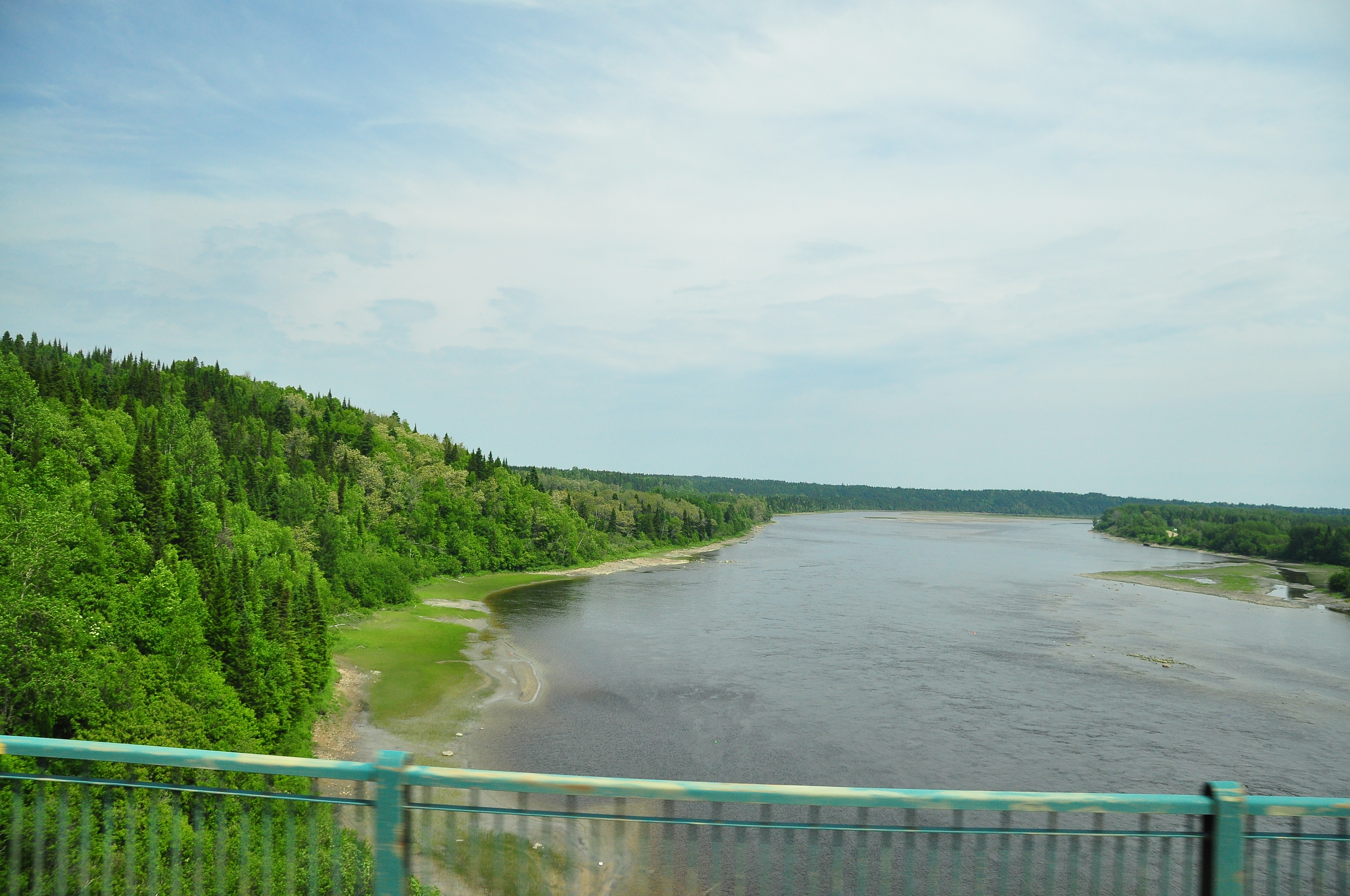 Rivière Betsiamites